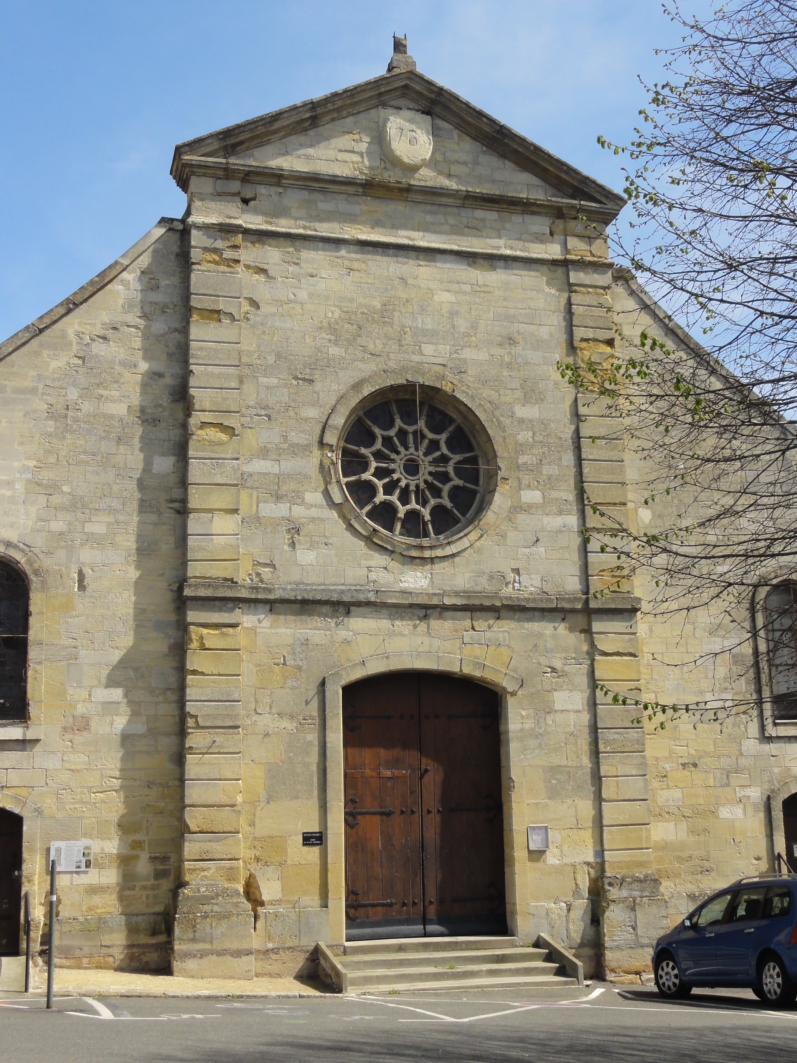 Église Saint-Nicolas de Meulan - voir titre.